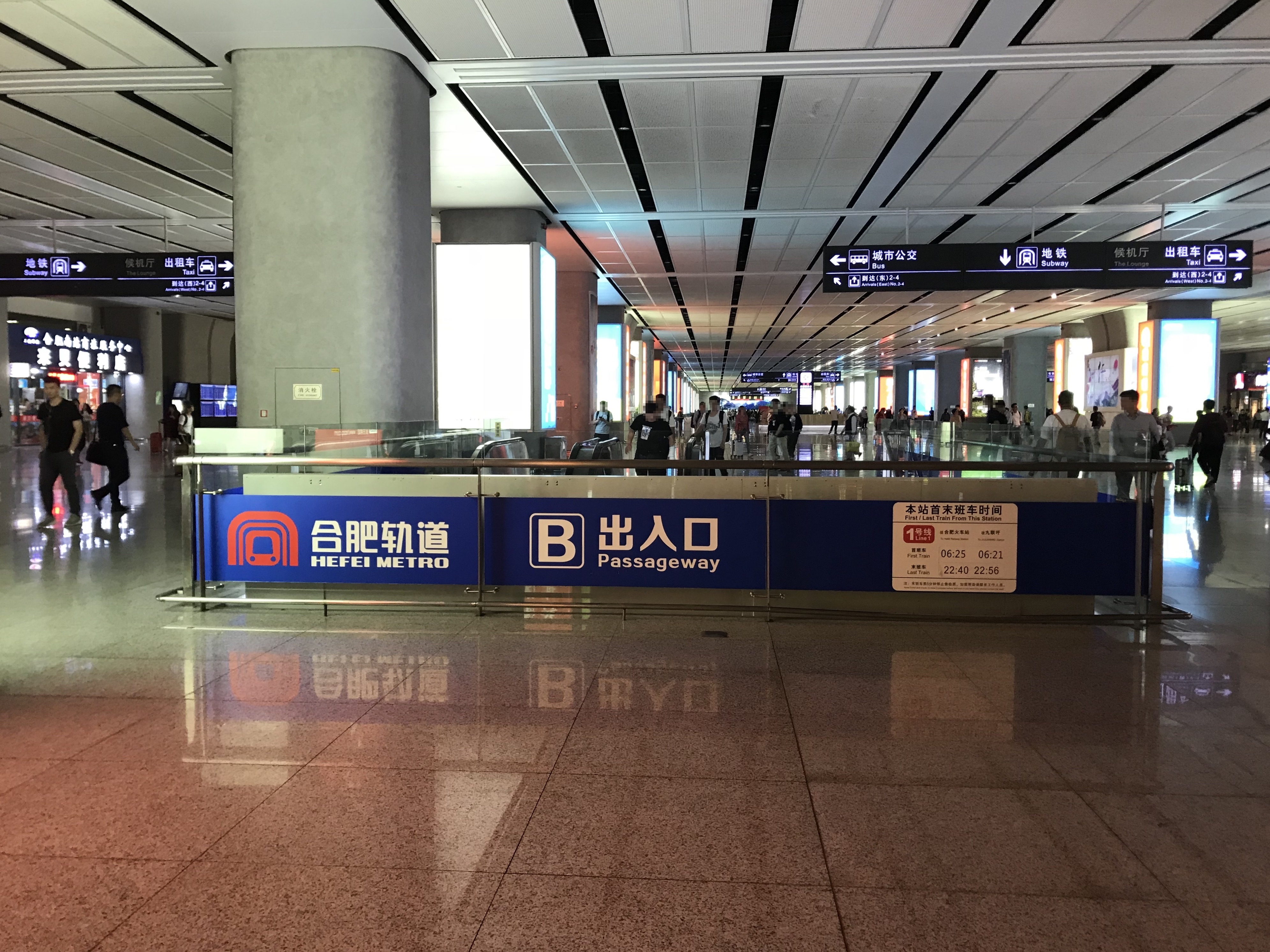 合肥南駅構内の合肥地下鉄・合肥南駅の2番出入り口